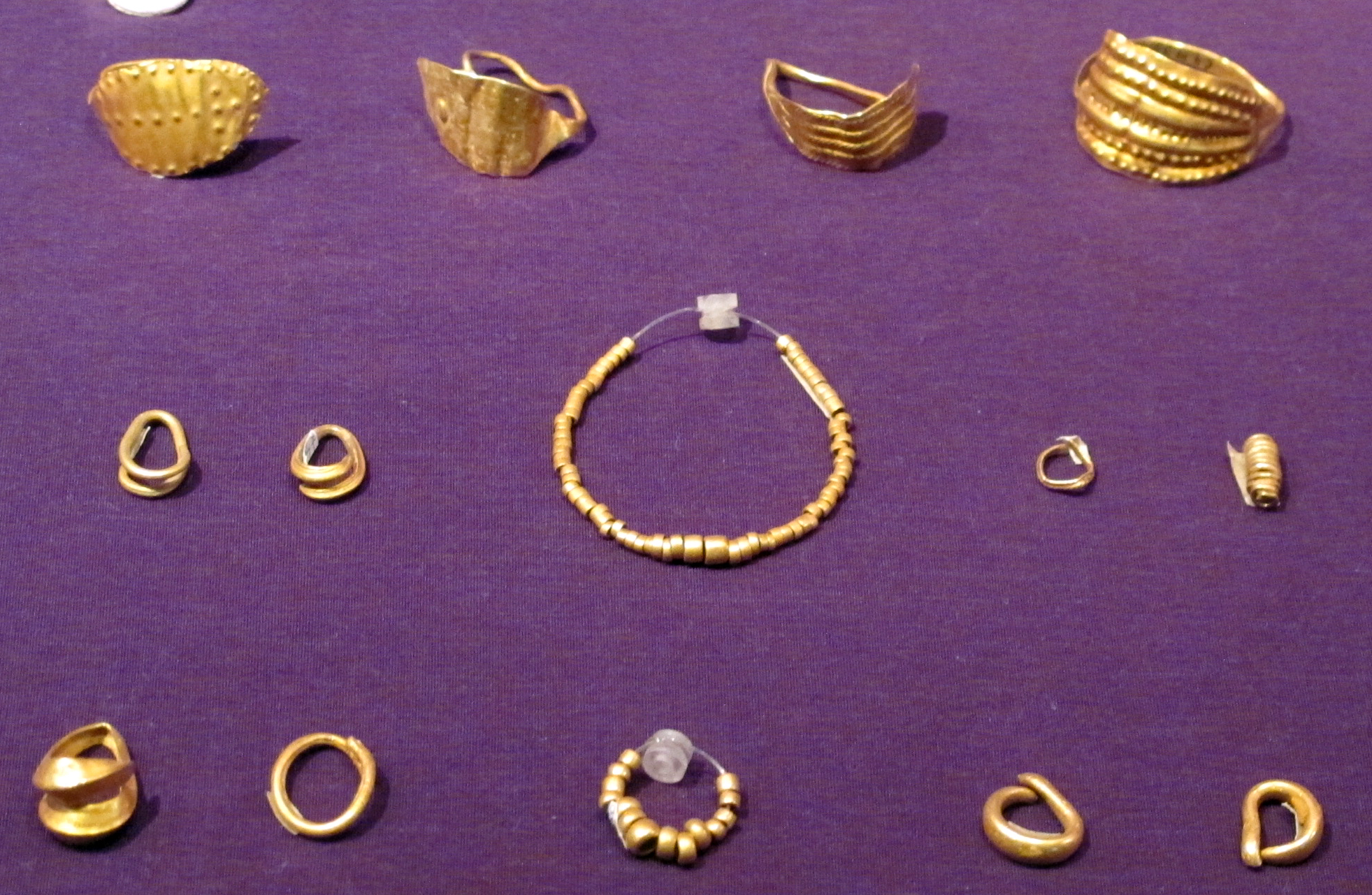 Età del bronzo, parure da sarata monteoru, xvi-xiv sec. ac.